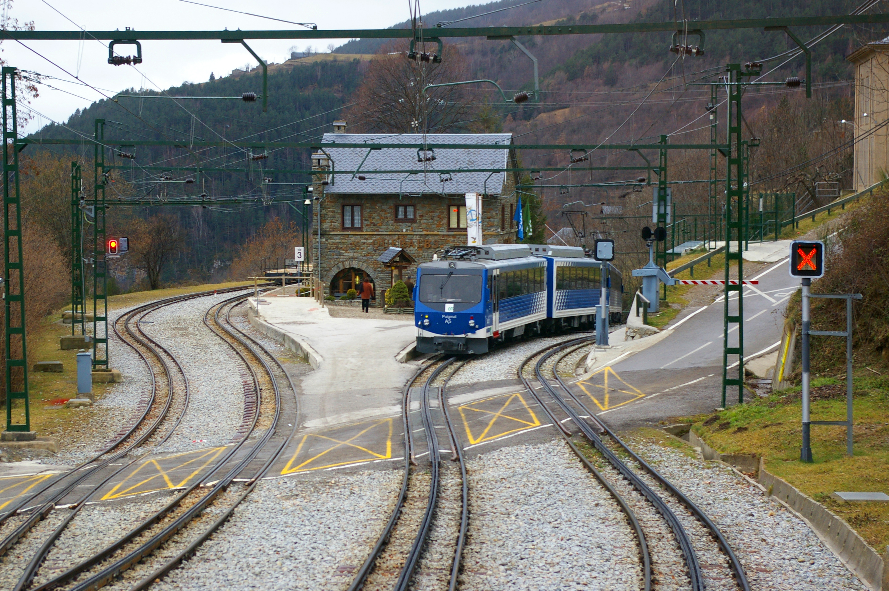 Estació de Queralbs, Cremallera Vall de Núria (FGC), (Ripollès, Catalunya)